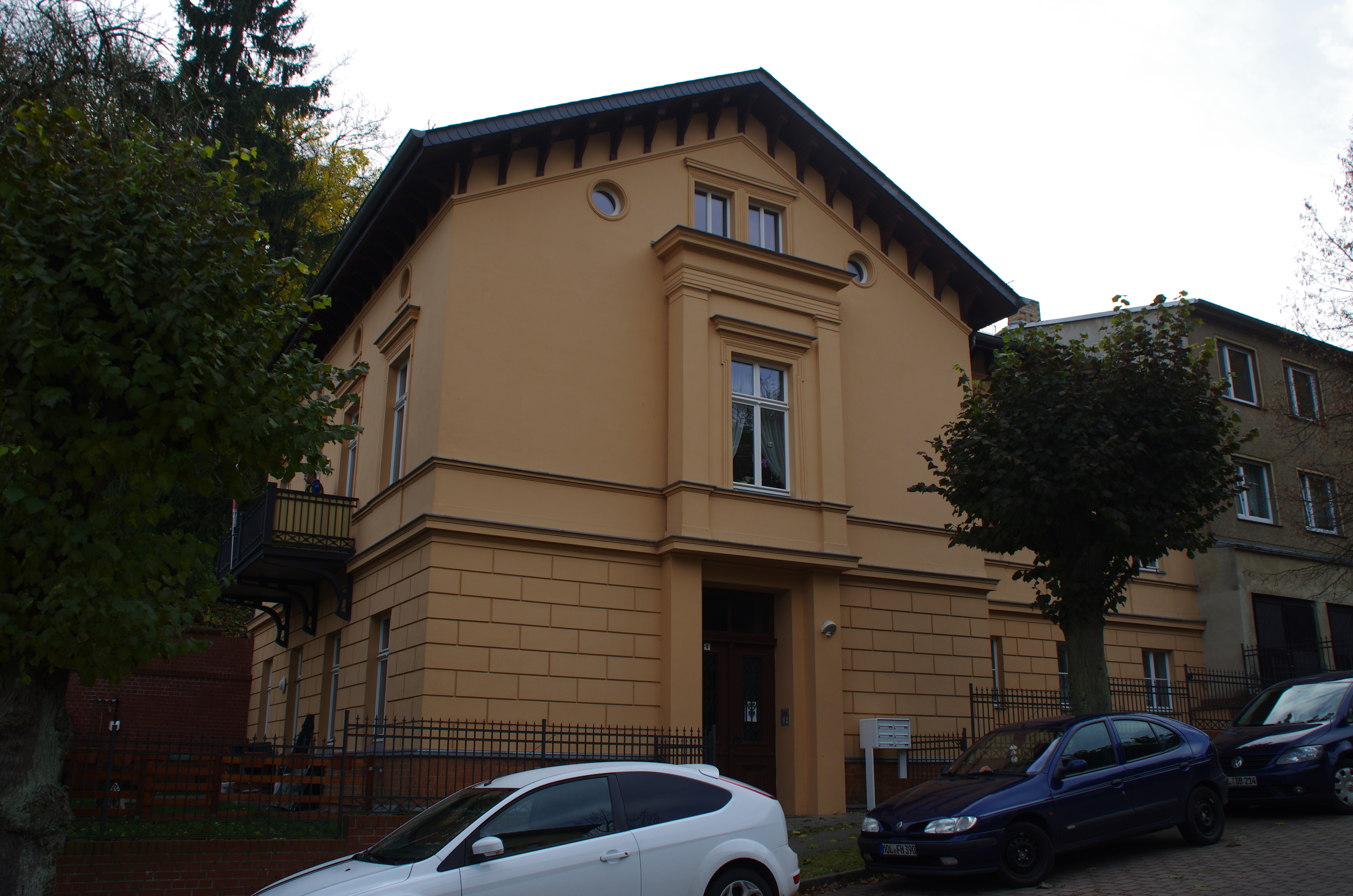 Bad Freienwalde (Oder) in Brandenburg. Das Haus Weinbergstraße 6 steth unter Denkmalschutz.